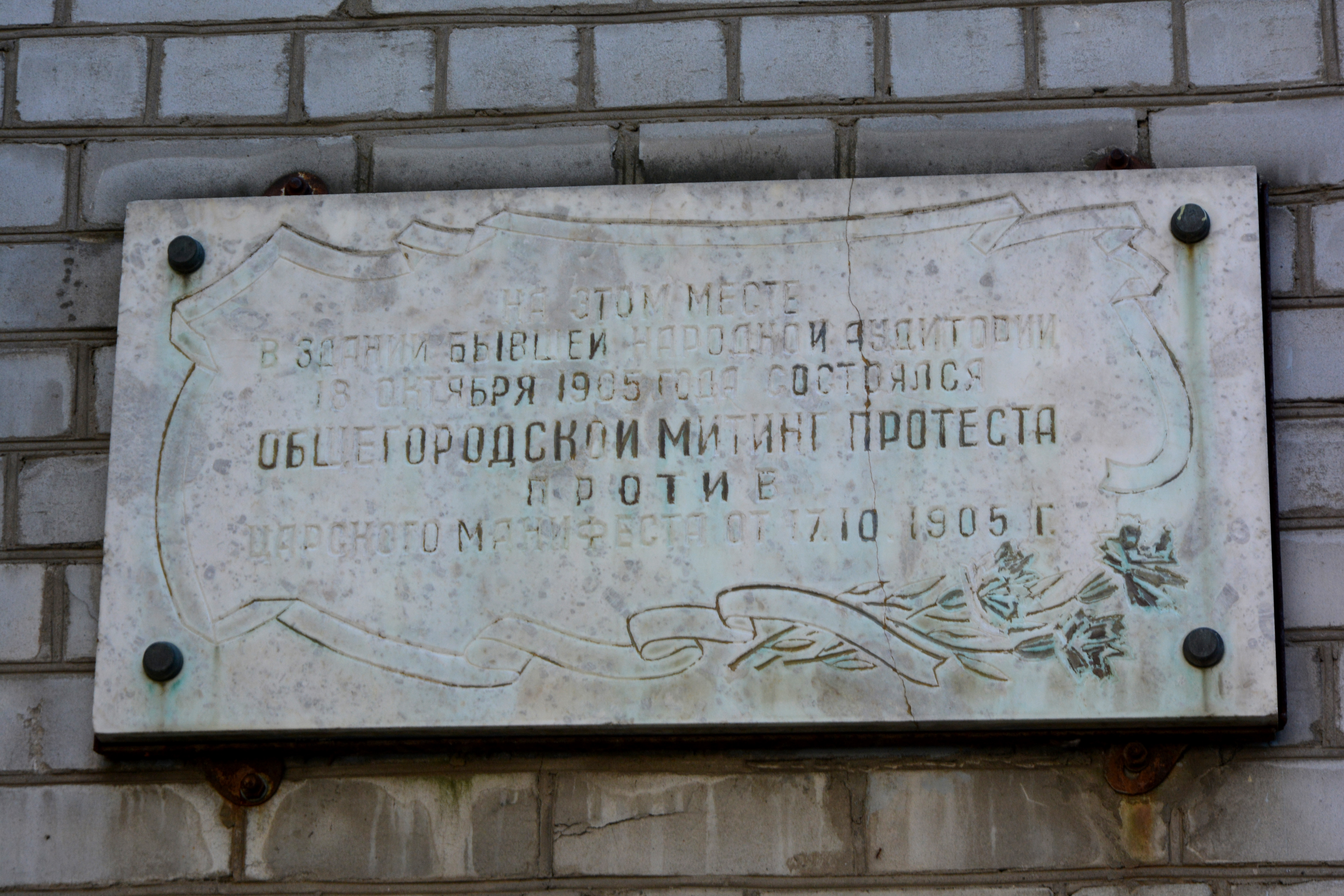 Меморіальна дошка з нагоди подій 1905 року., Кременчук, Вулиця 29 вересня, 11/19.